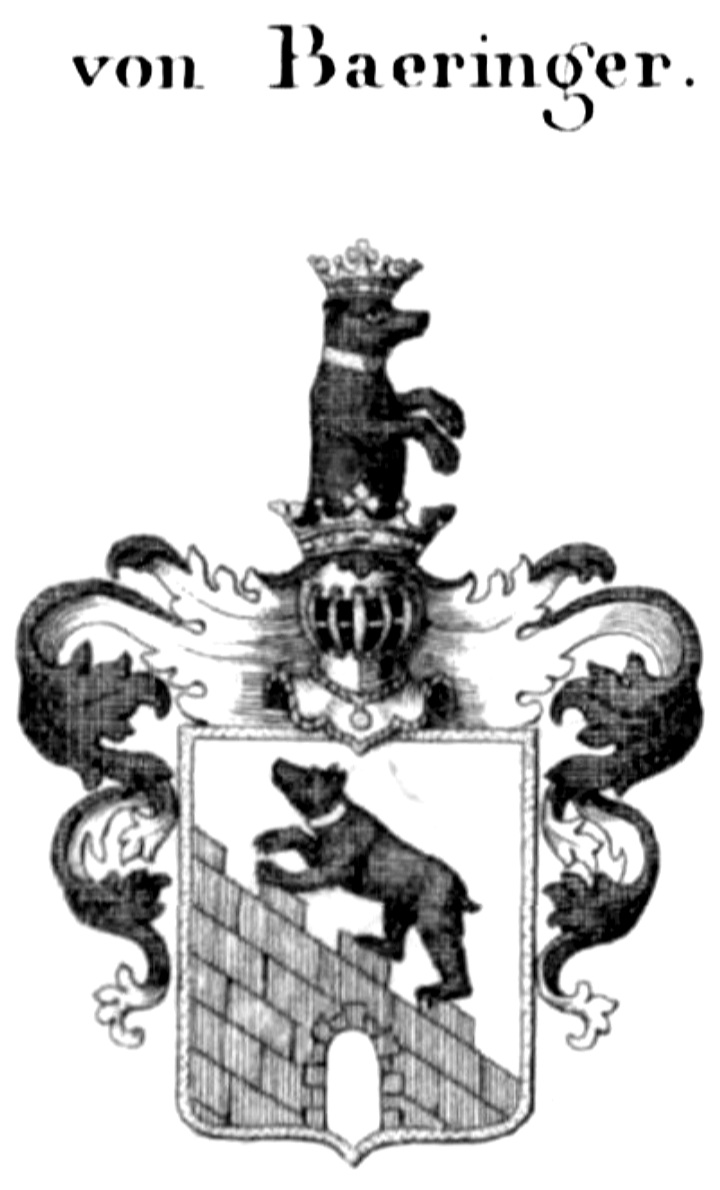 Wappen der Frau Luise Schoch, morganatische Gemahlin des Herzogs Leopold III. Friedrich Franz zu Anhalt, anlässlich ihrer Erhebung und ihrer Nachkommen als von Baeringer (Beringer), in den preußischen Adelsstand 1801. Schild nachempfunden dem mythischen Adelsgeschlecht der Beringer, Vorfahren der Askanier.